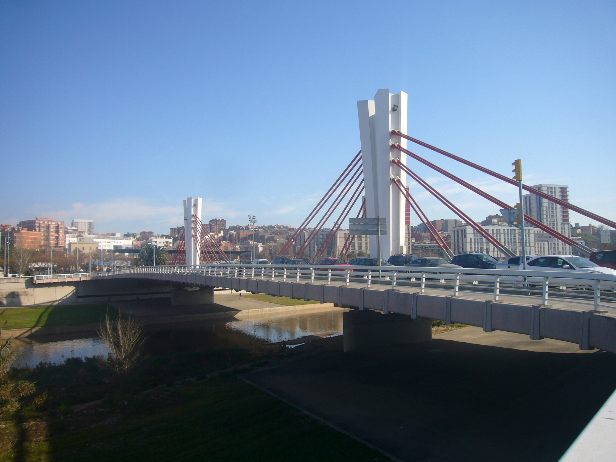 Pont sobre el Besòs, conectant el carrer de Potosí (Bon Pastor, Barcelona) en primer terme, amb l'avinguda de Can Peixauet (Santa Coloma de Gramenet) , al fons